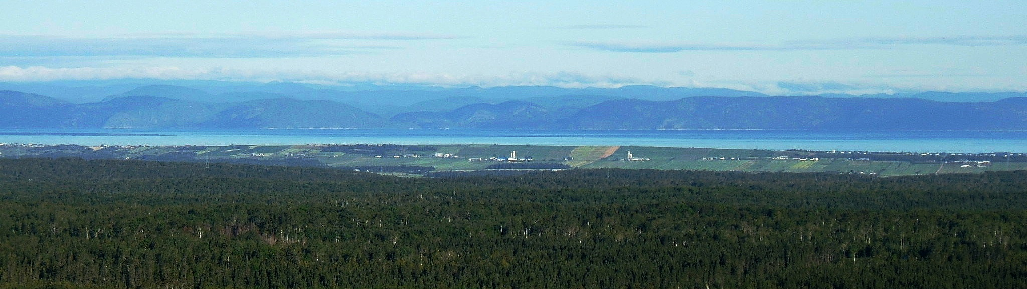 Panorama sur les montagnes de Charlevoix et la plaine du Saint-Laurent, vu à partir du 7e rang de Saint-François-Xavier-de-Viger, dans la MRC de Rivière-du-Loup, Québec, Canada. Août 2006. Auteur : Nicolas Gagnon